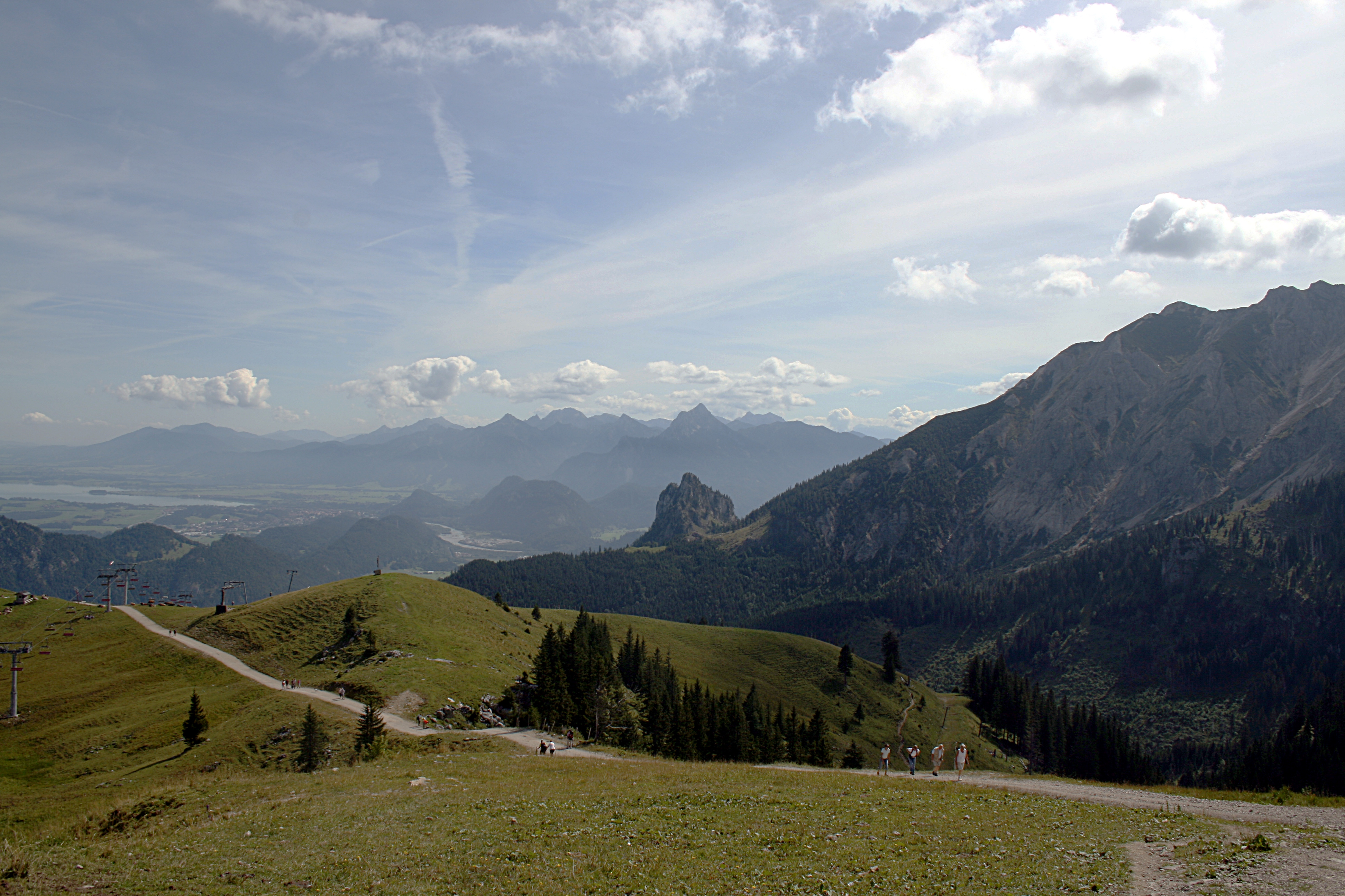 Blick_vom_Breitenberg_auf_Füssen